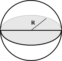 Наглядное пособие по вычислению объема шара.